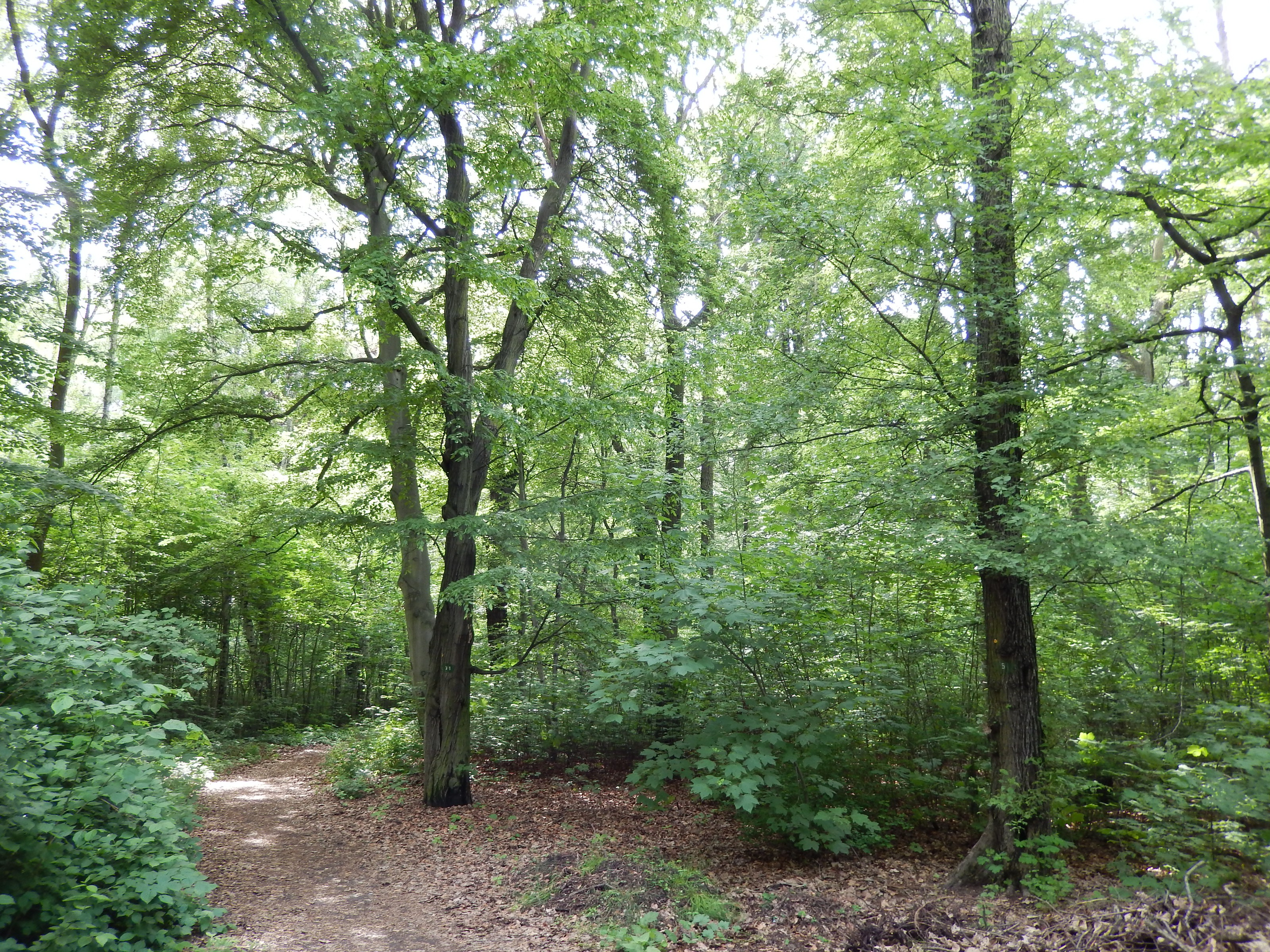 Im Südteil des Landschaftsparks der Karl-Bonhoeffer-Nervenklinik, vormals Karl-Bonhoeffer-Heilstätten, Wittenauer Heilstätten bzw. Irrenanstalt Dalldorf